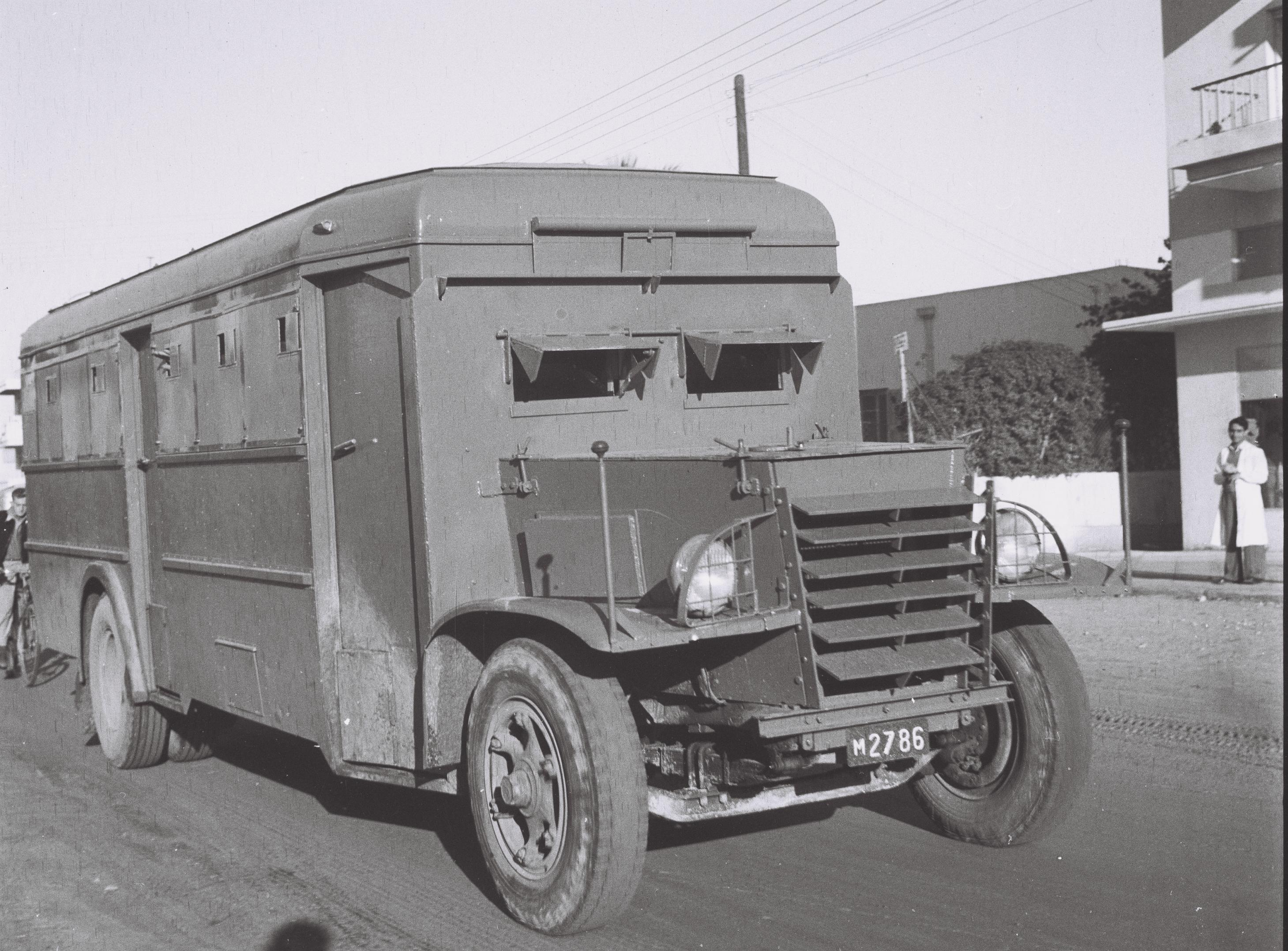 אוטובוס משוריין של חברת הארגז במפעלי החברה